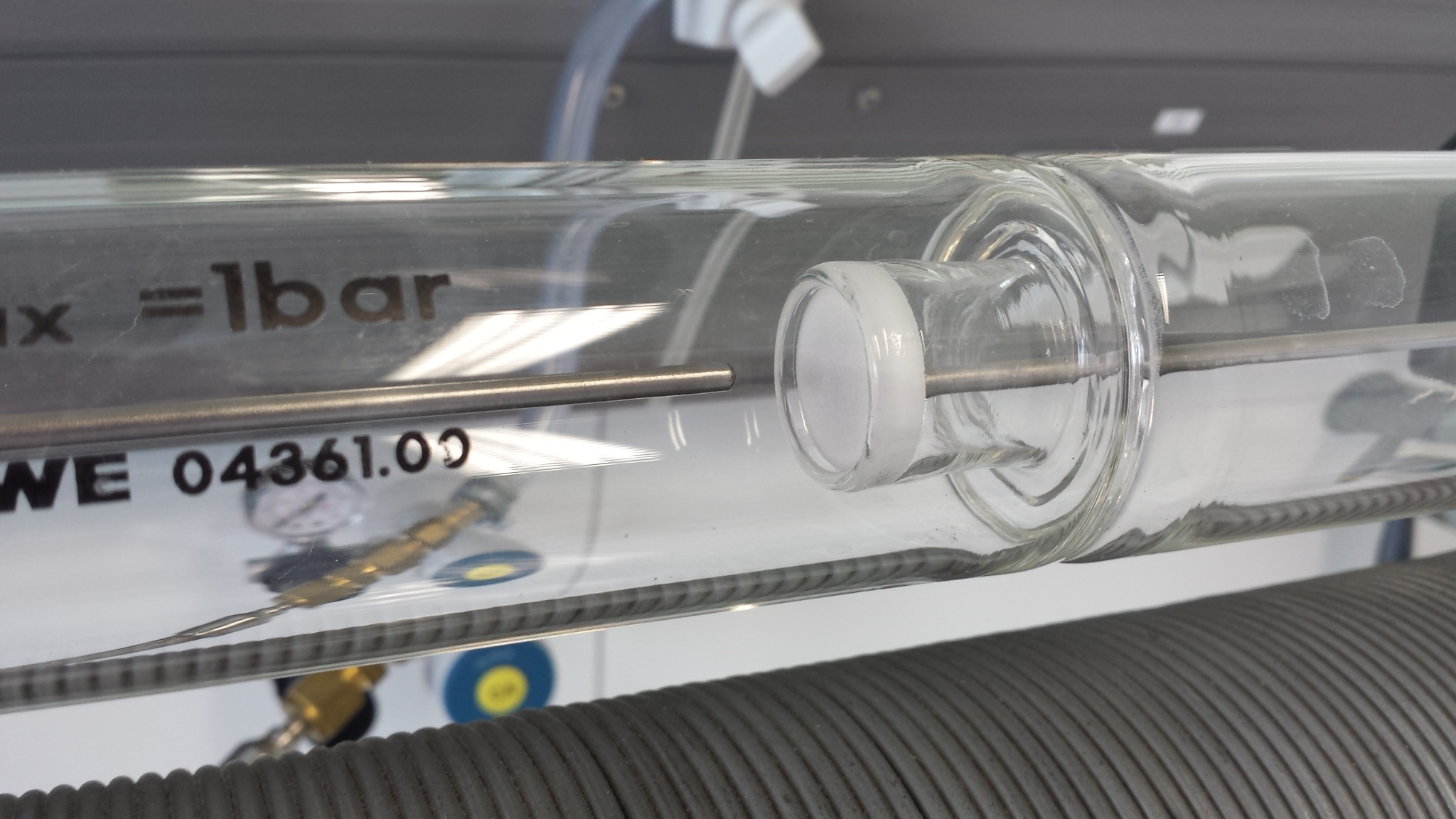 Nahansicht einer Doppelkammer, die über eine poröse Membran miteinander verbunden ist. Über diese wird das Gas entspannt. Im Bild zu sehen sind die beiden Thermofühler, mit denen die Temperatur auf jeder Seite gemessen wird.